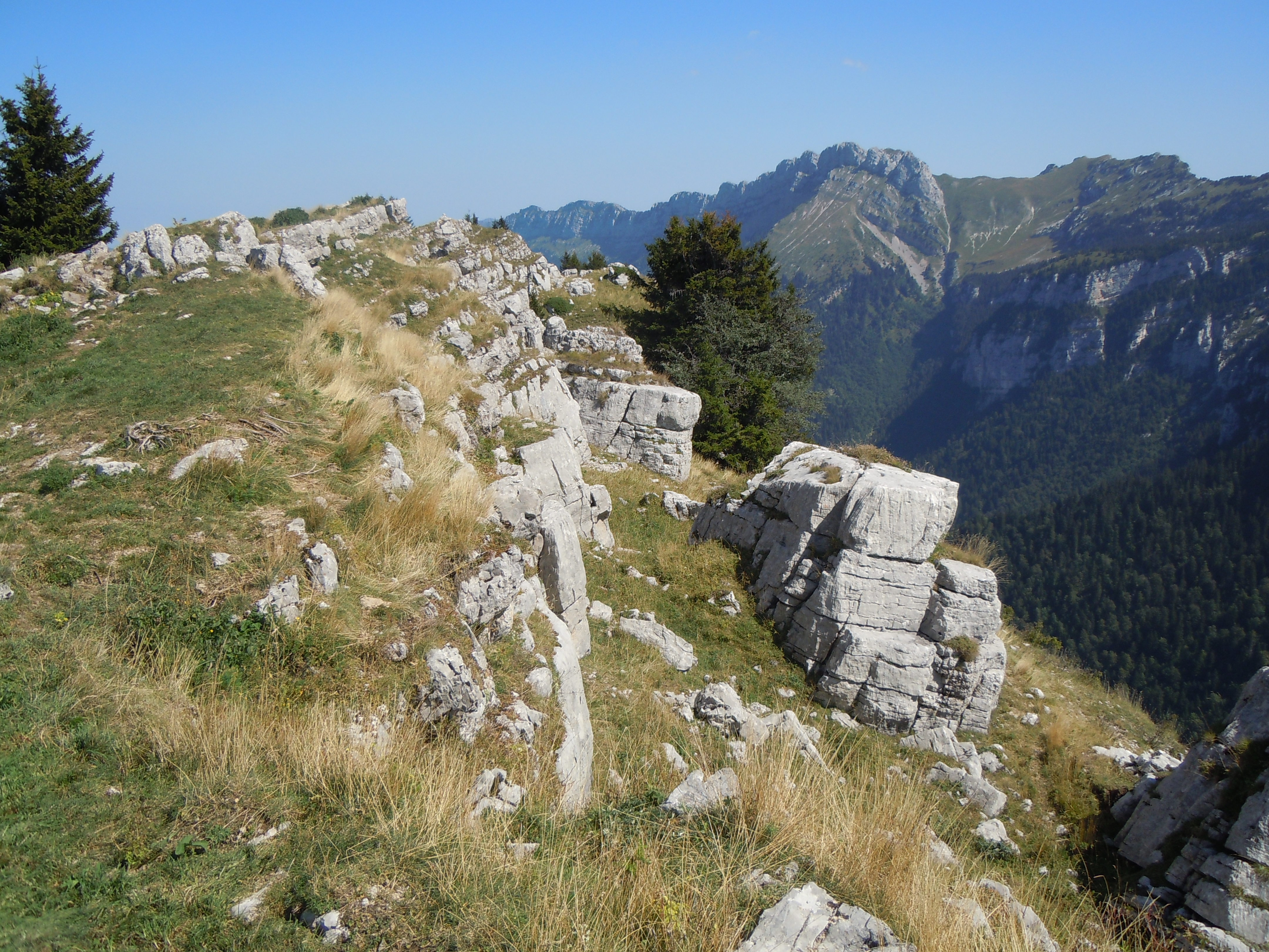 Sommet du Roc d'Arguille - Isère - france